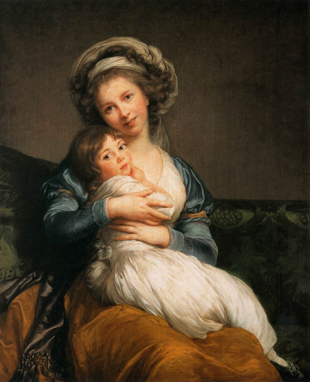 Madame Vigée-Le Brun et sa fille, Jeanne-Lucie, dite Julie (1780 - 1819).